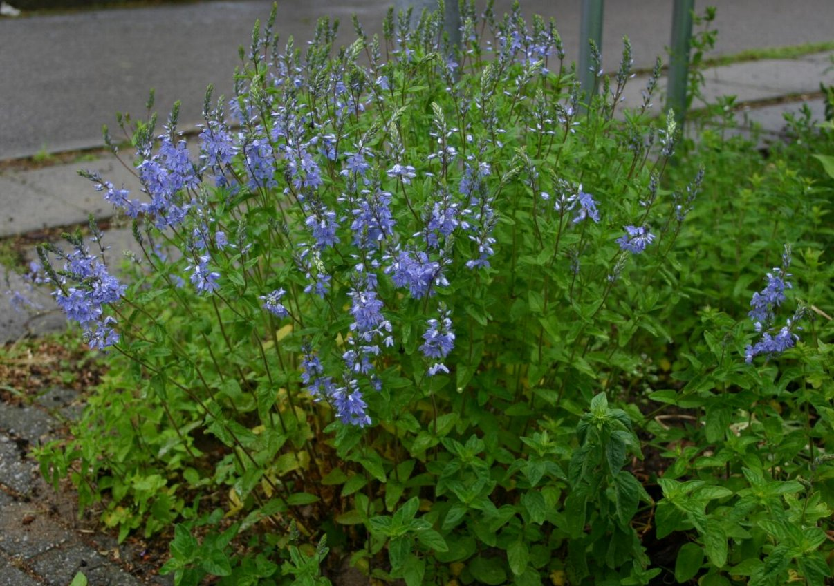 Veronica austriaca: Habit